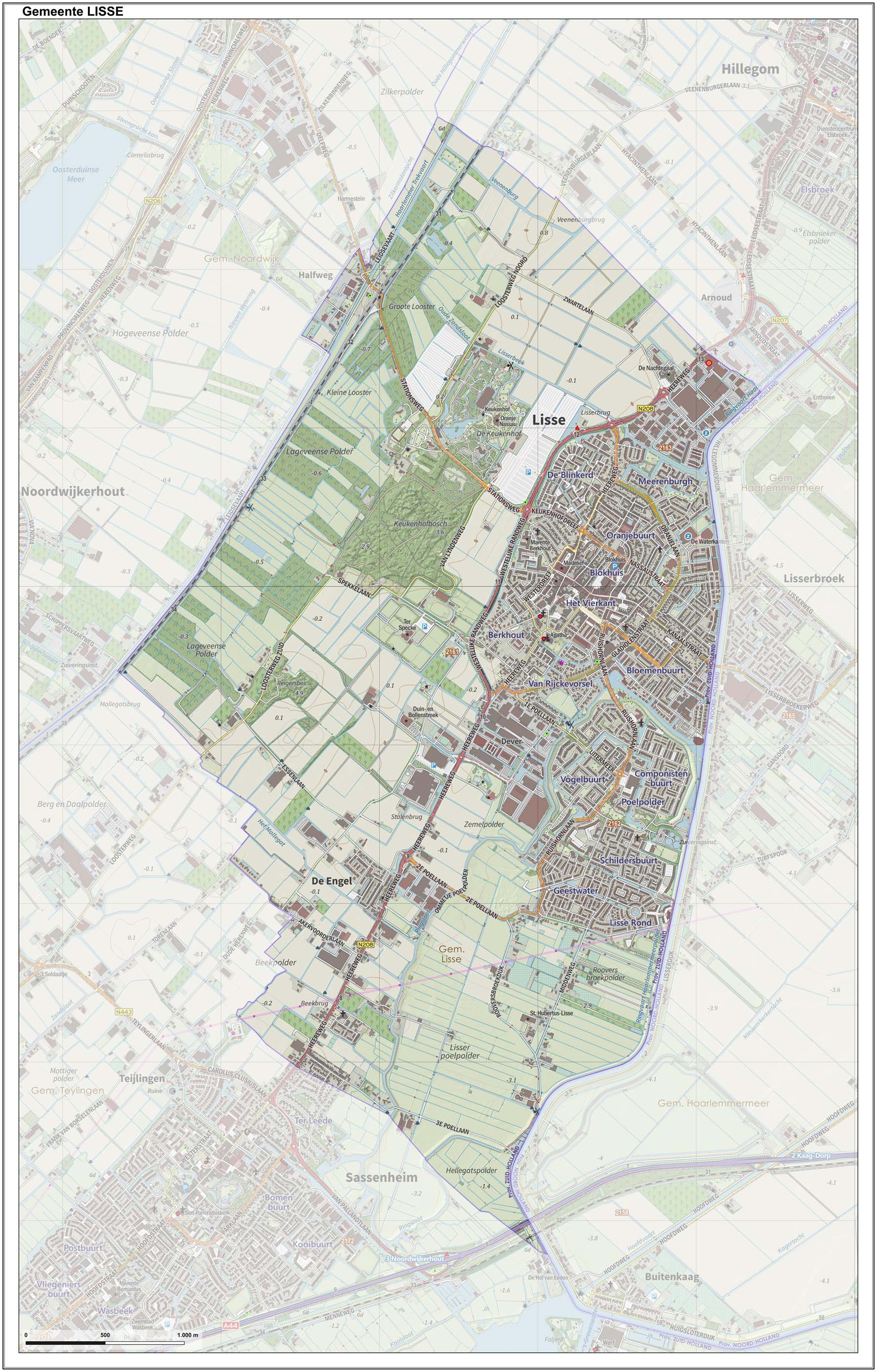 Topografische gemeentekaart. Resolutie: 400 pixels/km. Kaartbeeld samengesteld uit de open geodata van de Top10NL en Top25namen (Kadaster), Creative Commons-BY licentie. Gebouwvlakken uit open geodata BAG extract. Wegen uit de OpenStreetMap, OpenStreetMap community. Reliëfschaduw uit de Actuele Hoogtekaart AHN2. Samenstelling en kleurenschema: Jan-Willem van Aalst, met QGIS. Zie ook de Legenda.